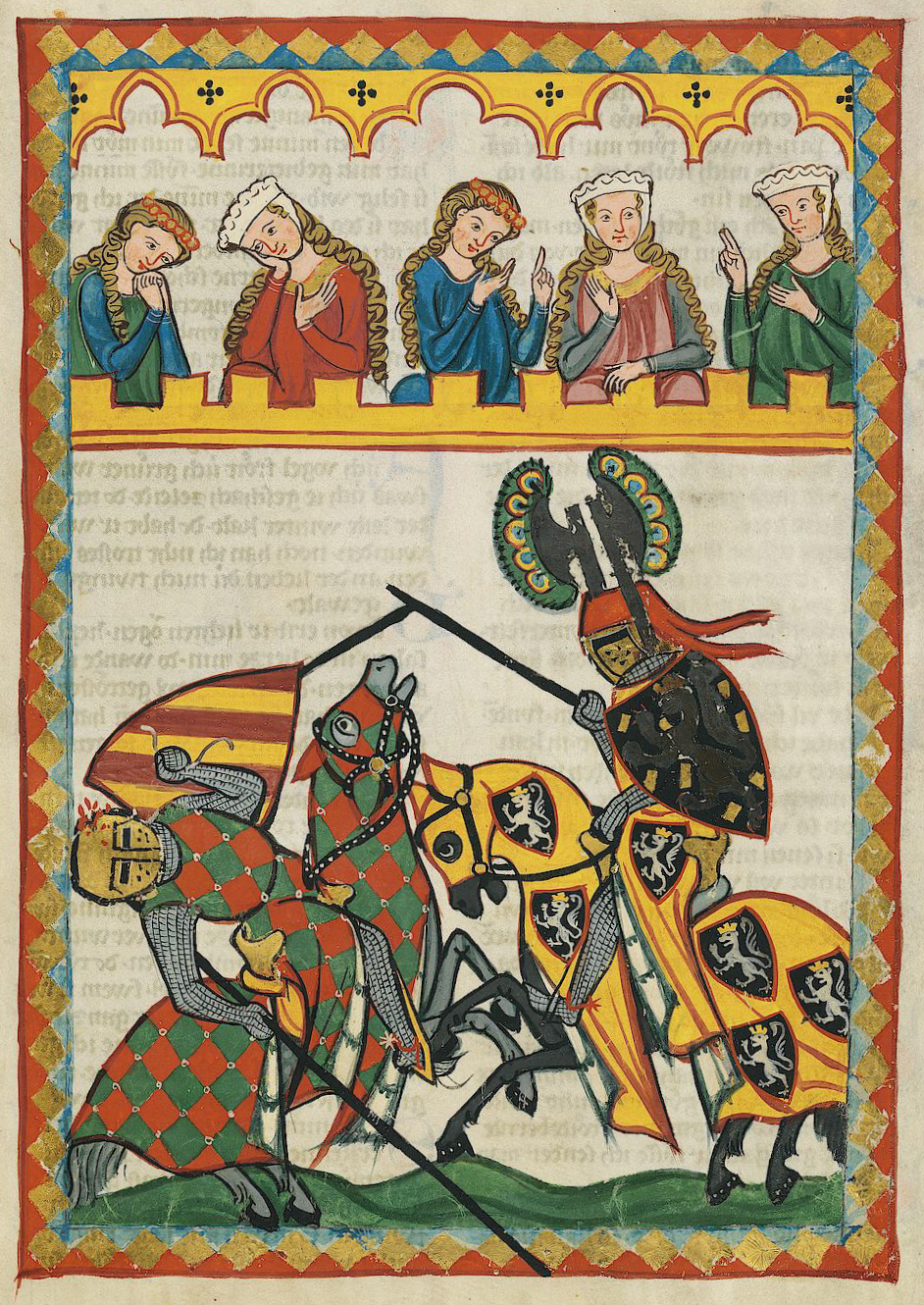 Codex Manesse, UB Heidelberg, Cod. Pal. germ. 848, fol. 52r: Walther von Klingen (detail)